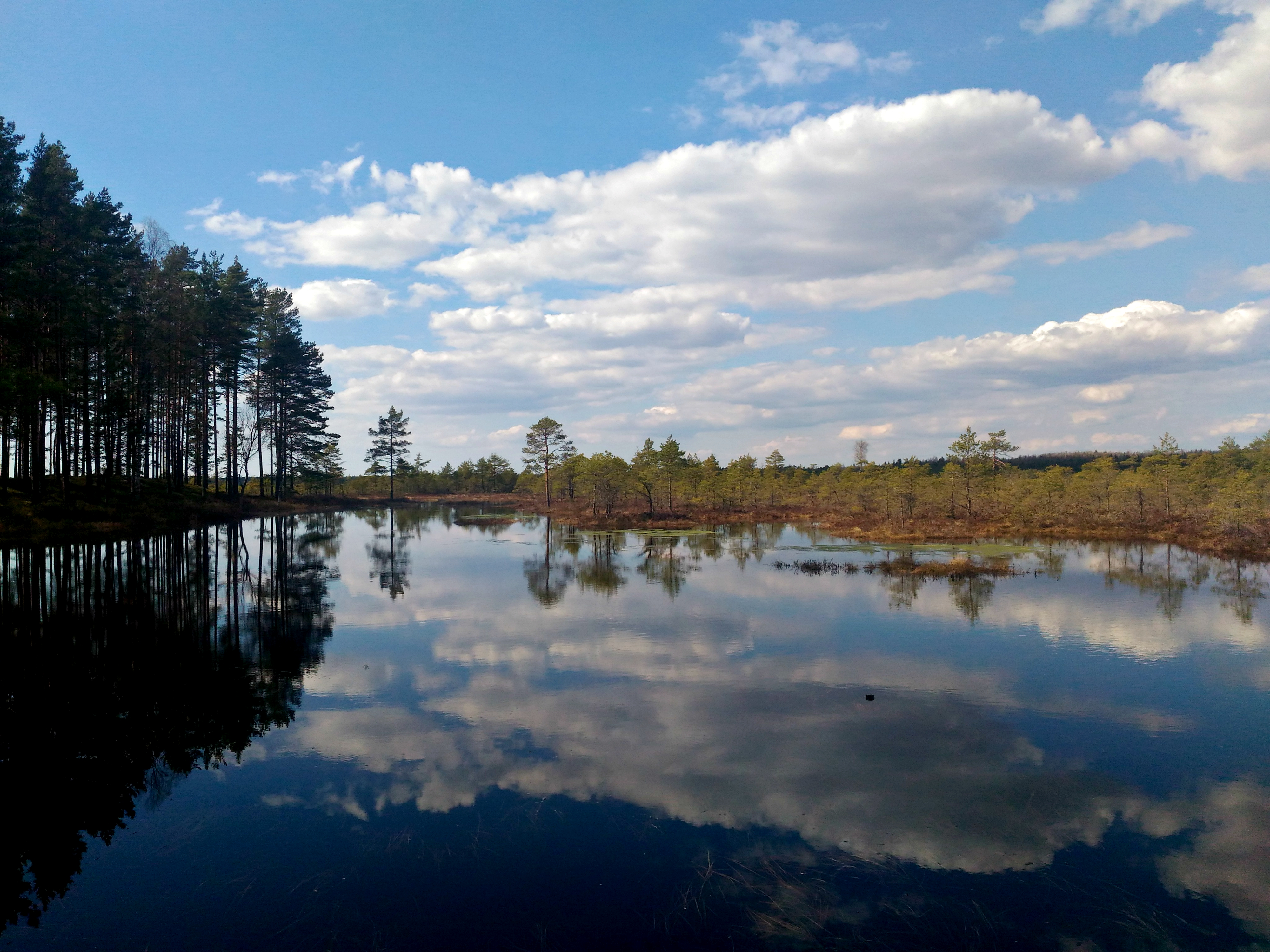 Peegeldus Lindi rabalaukal